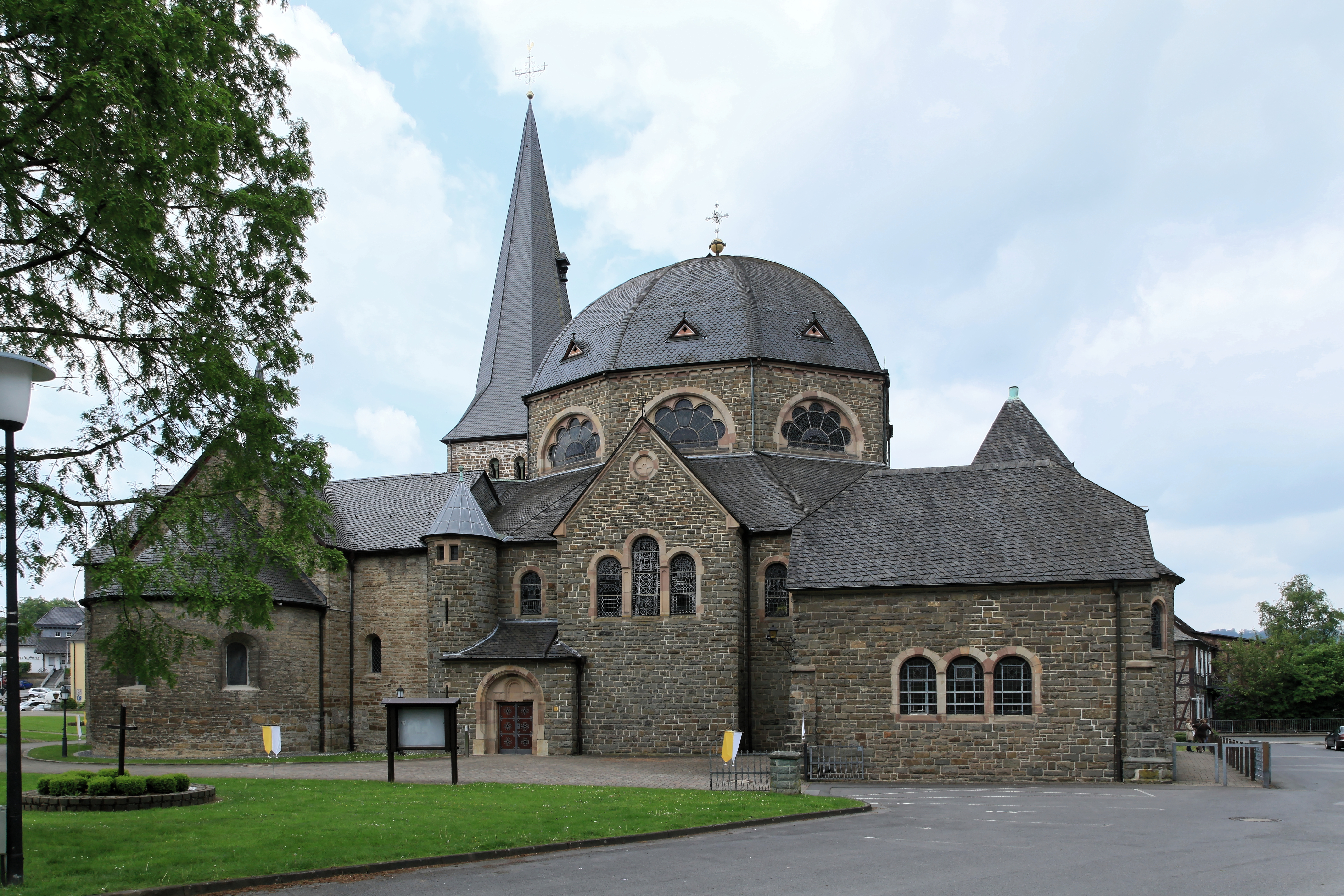 St. Blasius, Dechant-Löcker-Weg in Balve